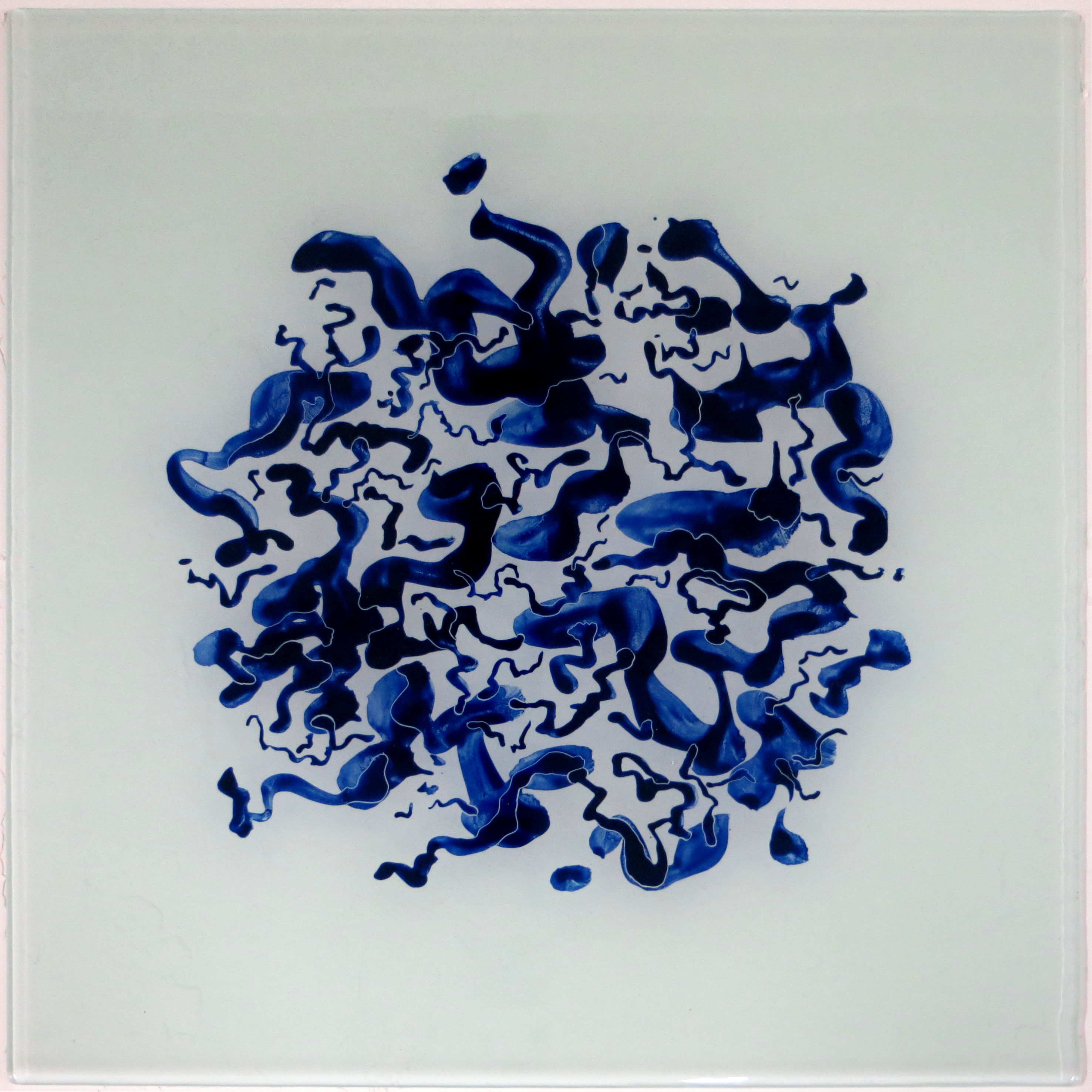 peinture sous verre (fixé sous verre), œuvre de Carlo Roccella